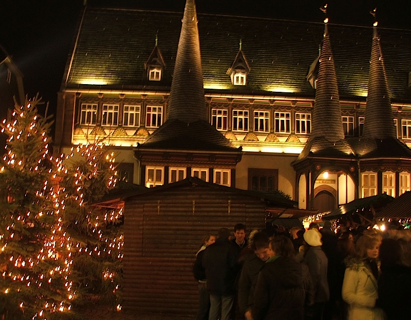 Weihnachtsmarkt 2008 vor dem alten Rathaus